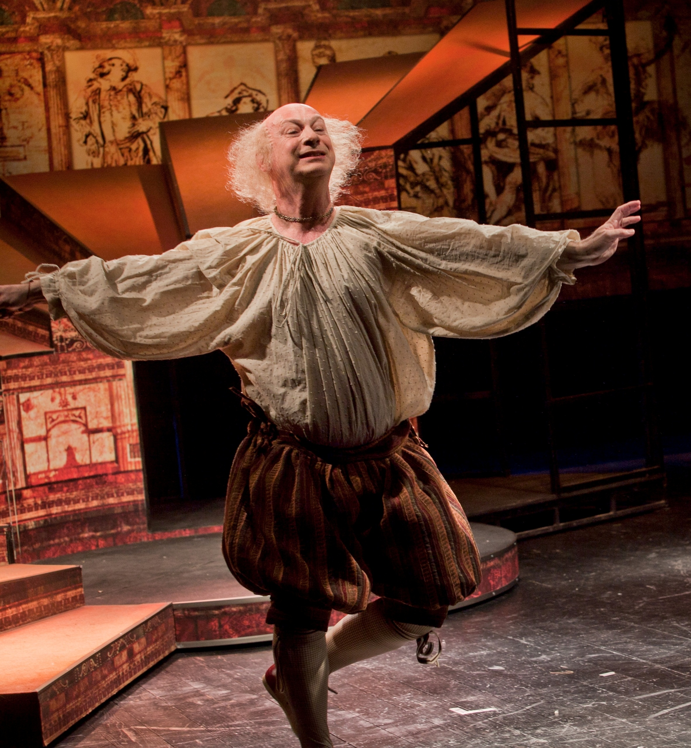 ארז שפריר בהצגה משחק של אהבה ומזל